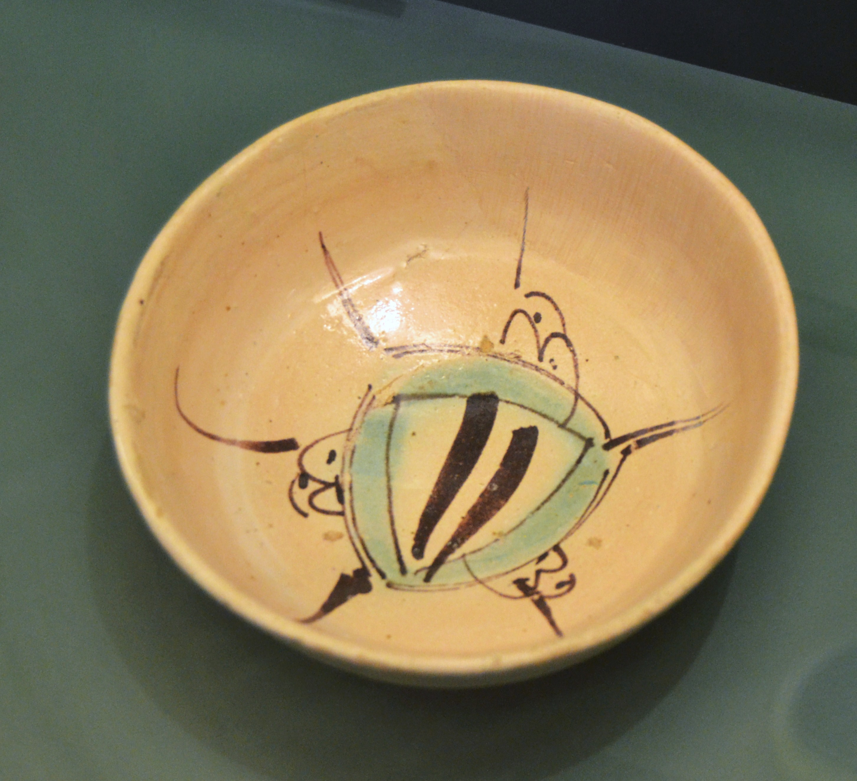 Escudella, Paterna, segle XIV, pisa decorada en verd i negre, museu de Ceràmica de València.